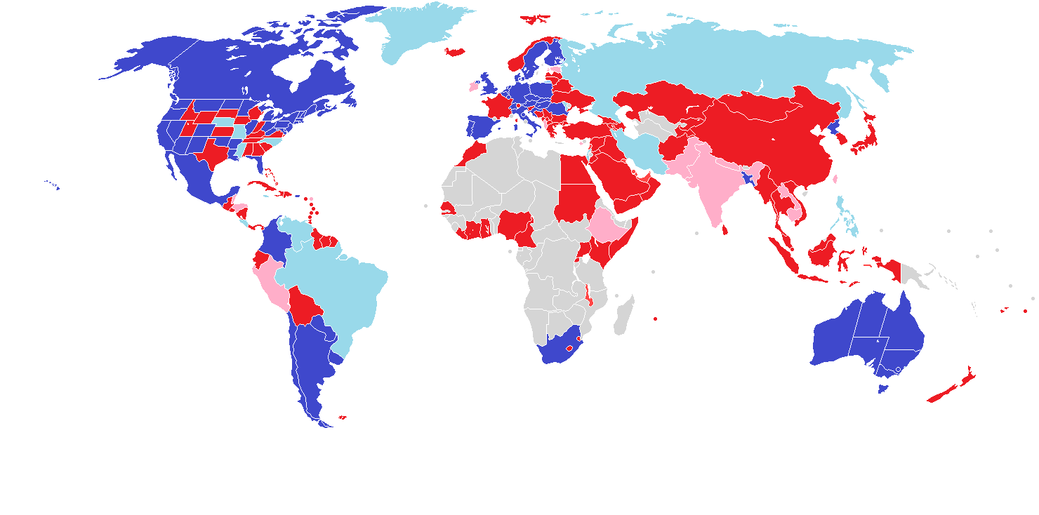 upgraded map